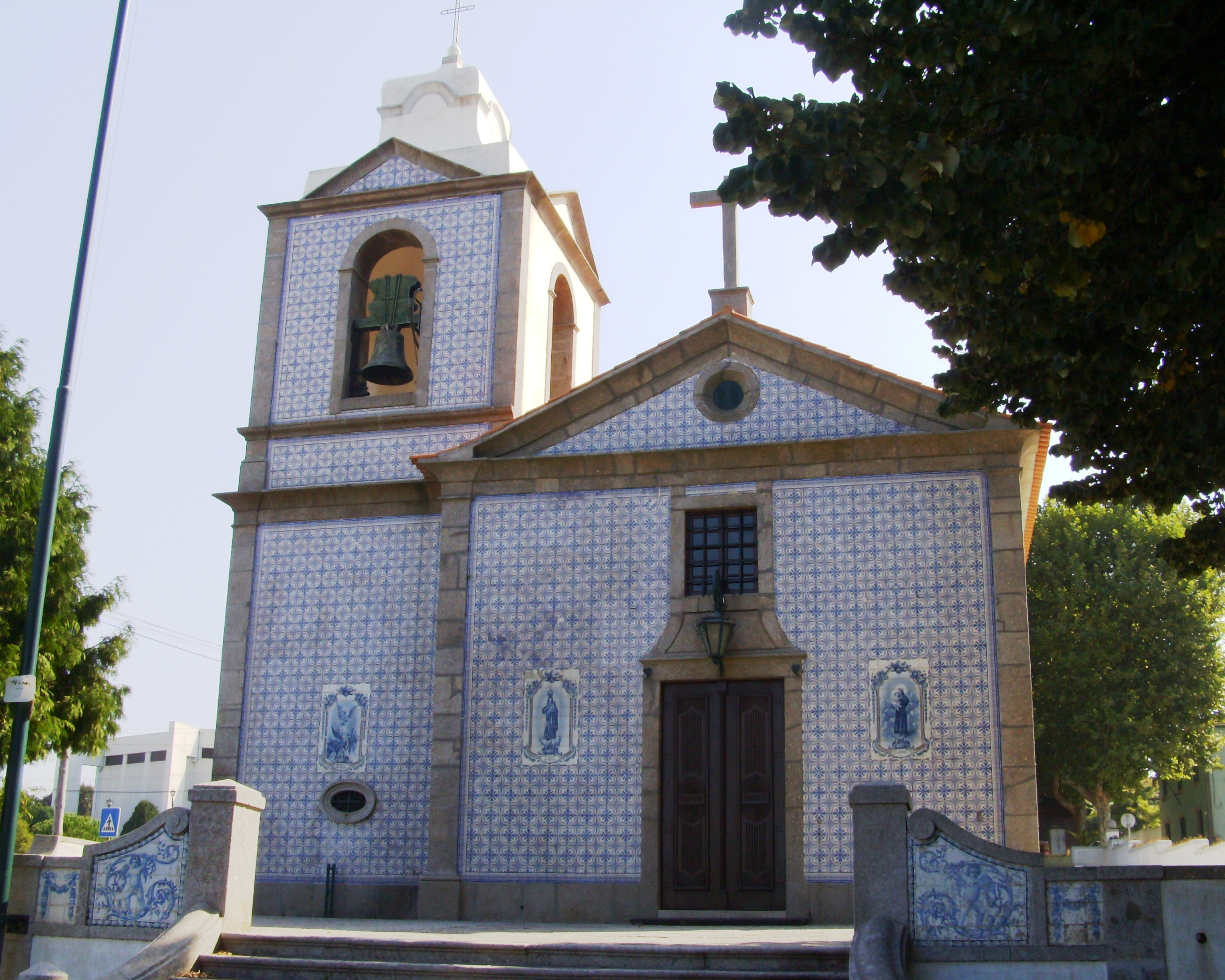 Antiga Igreja Matriz de Arcozelo, Vila Nova de Gaia, distrito do Porto, Portugal.